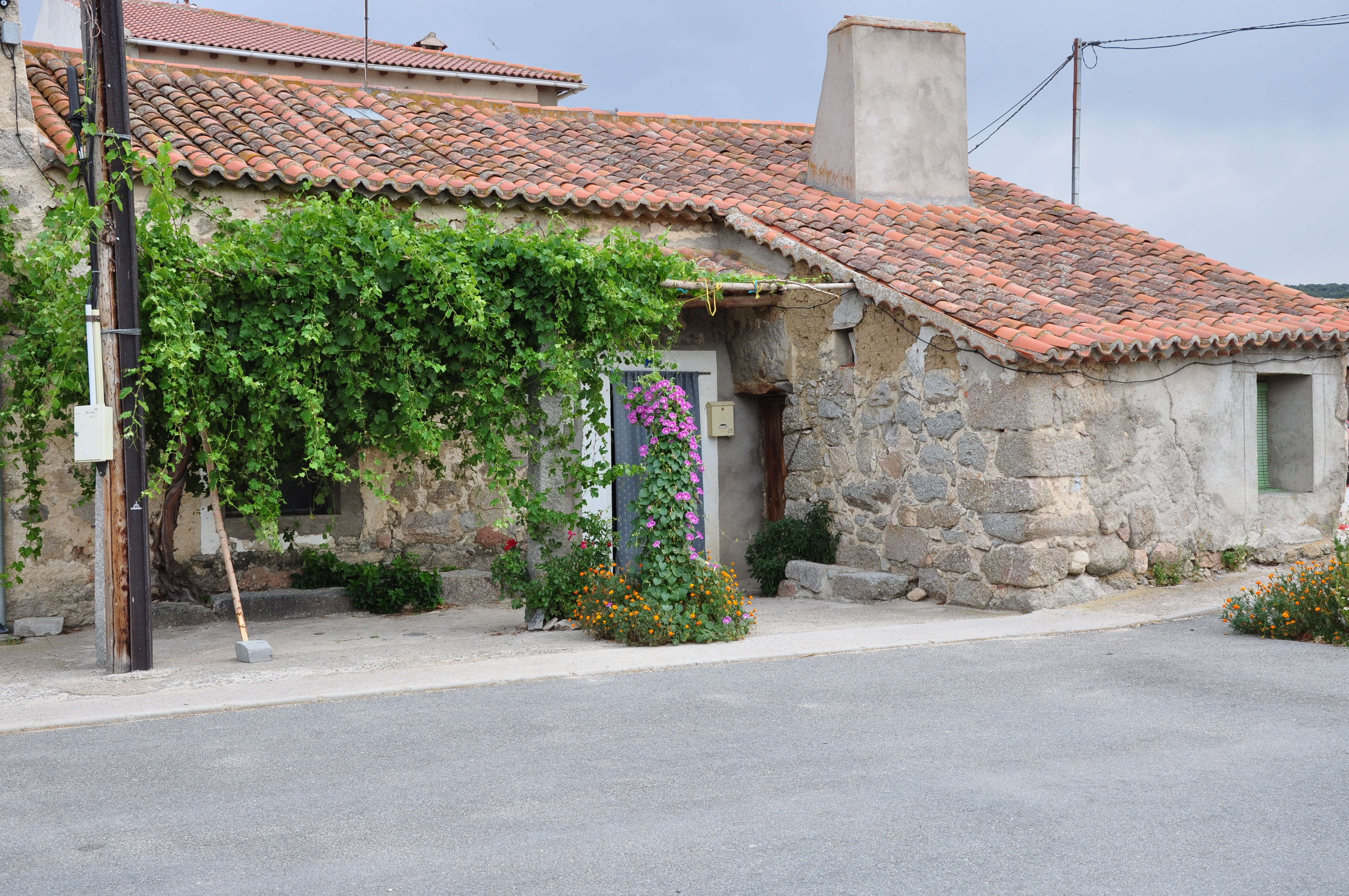 Casa tradicional en Santa María del Arroyo (Ávila), España.